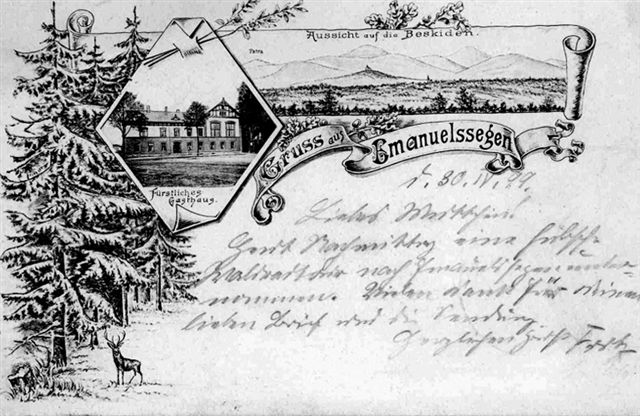 Pocztówka z 1899 przedstawiająca Murcki.